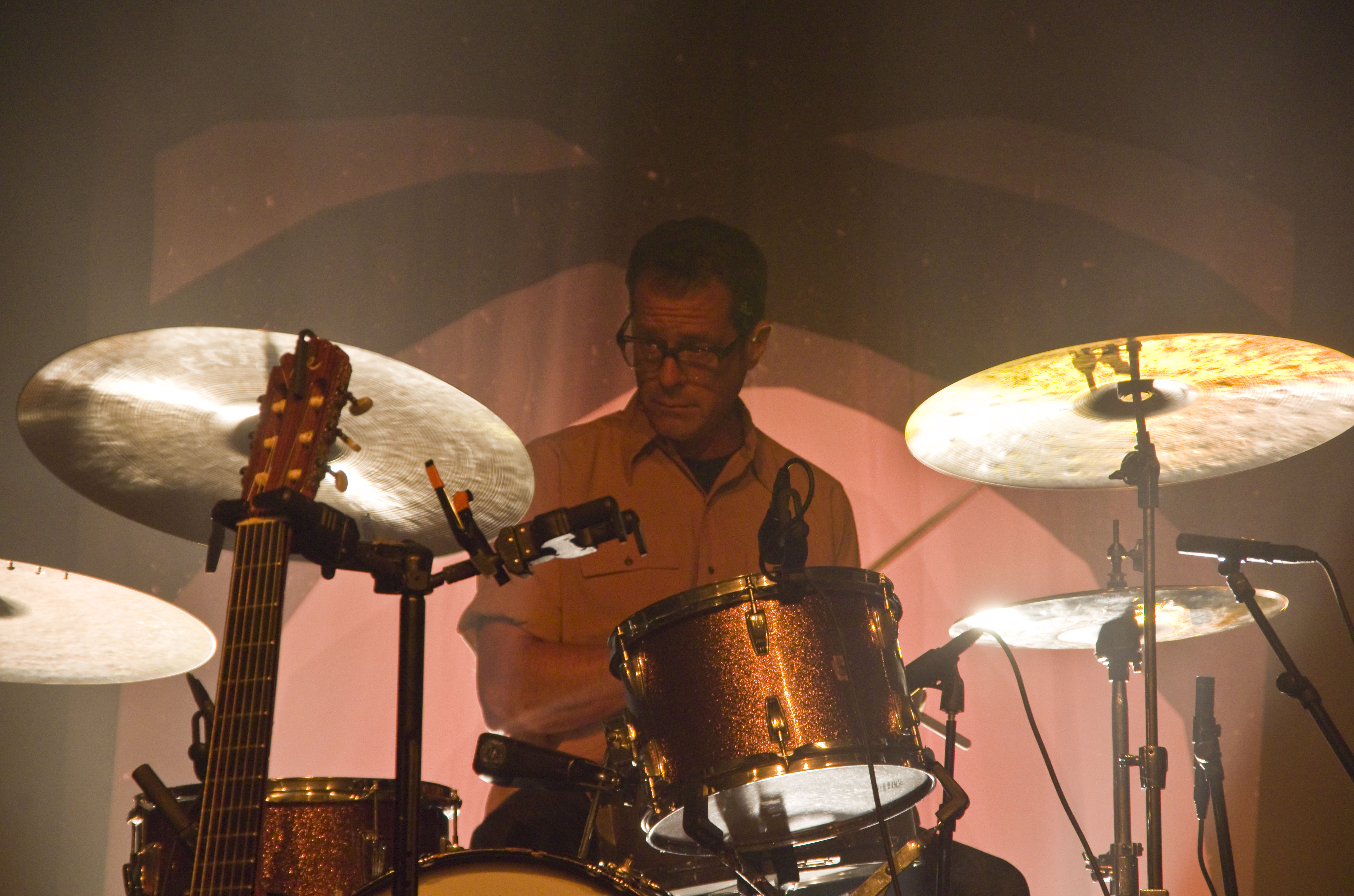 Das Zelt-Musik-Festival 2016 in Freiburg im Breisgau 13.07.2016 Calexico